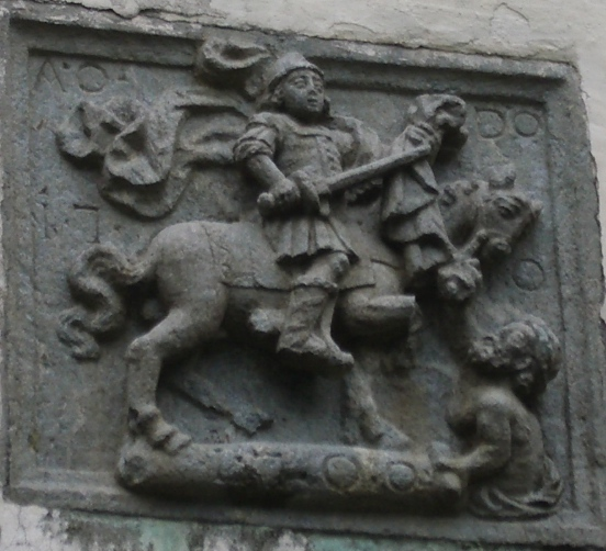 Soazza GR, Switzerland self-made, August 2006